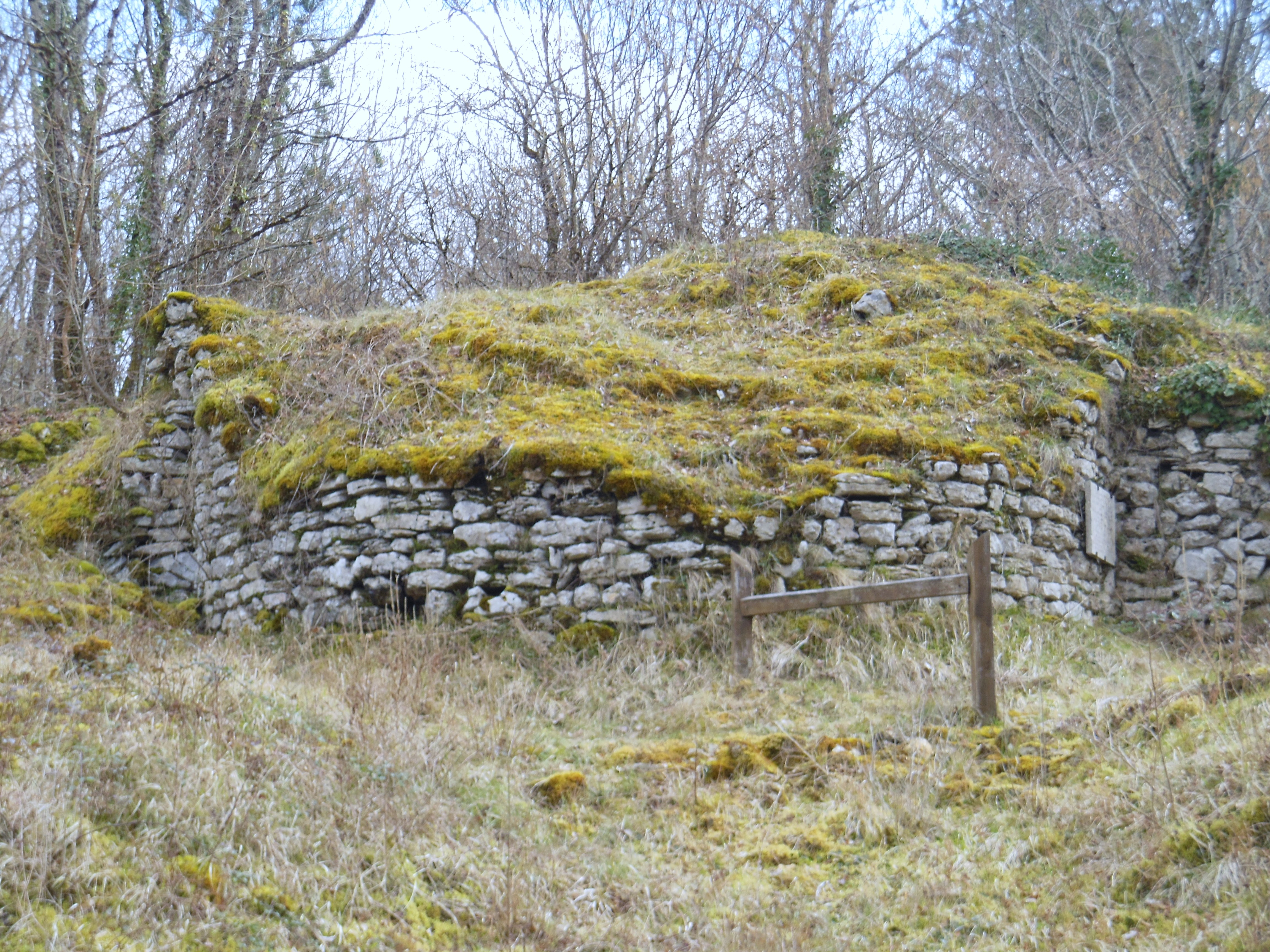 Vestiges d'une des tours du camp romain de Cora (Yonne, Bourgogne, France).